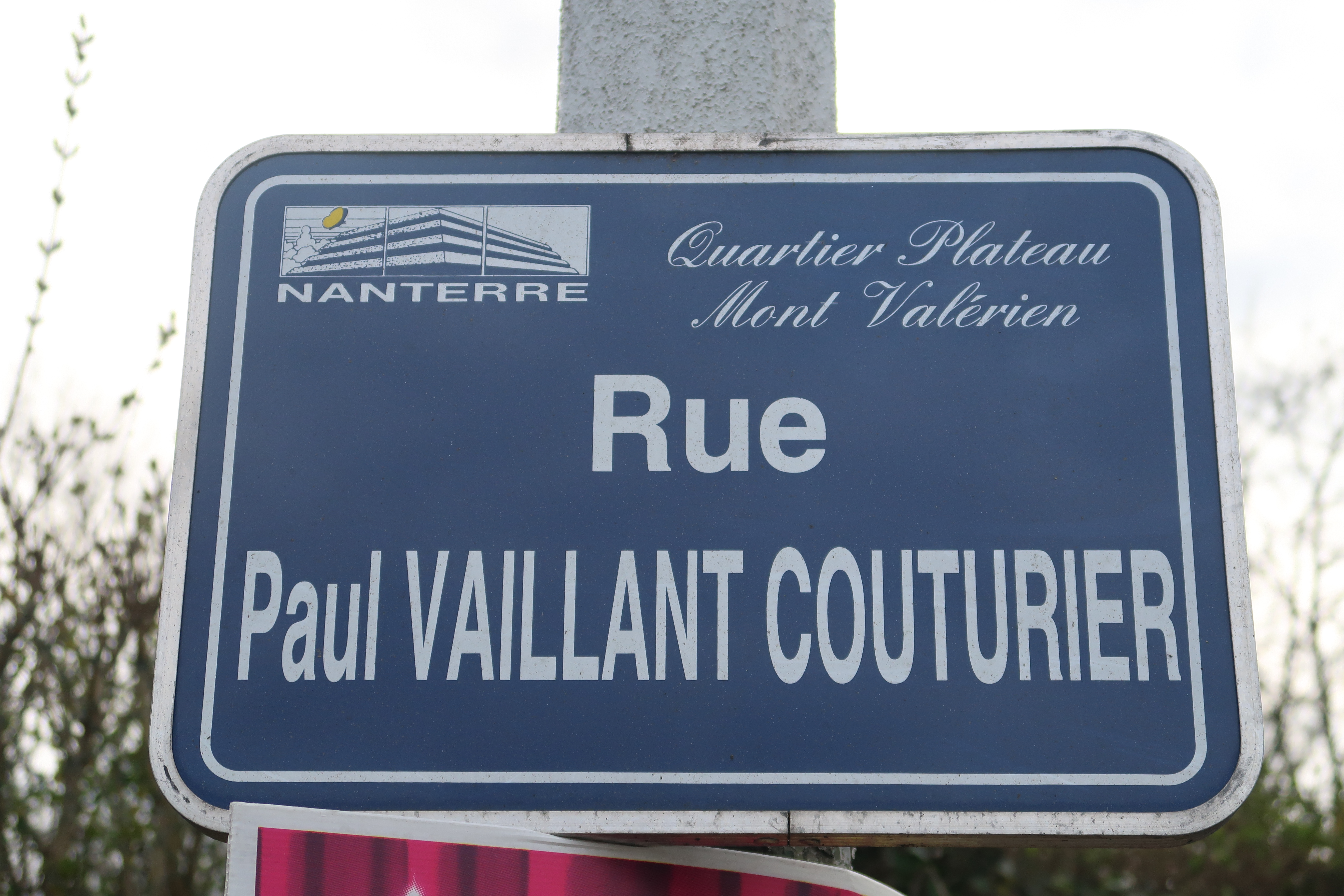 Plaque de la rue Paul Vaillant-Couturier à Nanterre (Hauts-de-Seine).